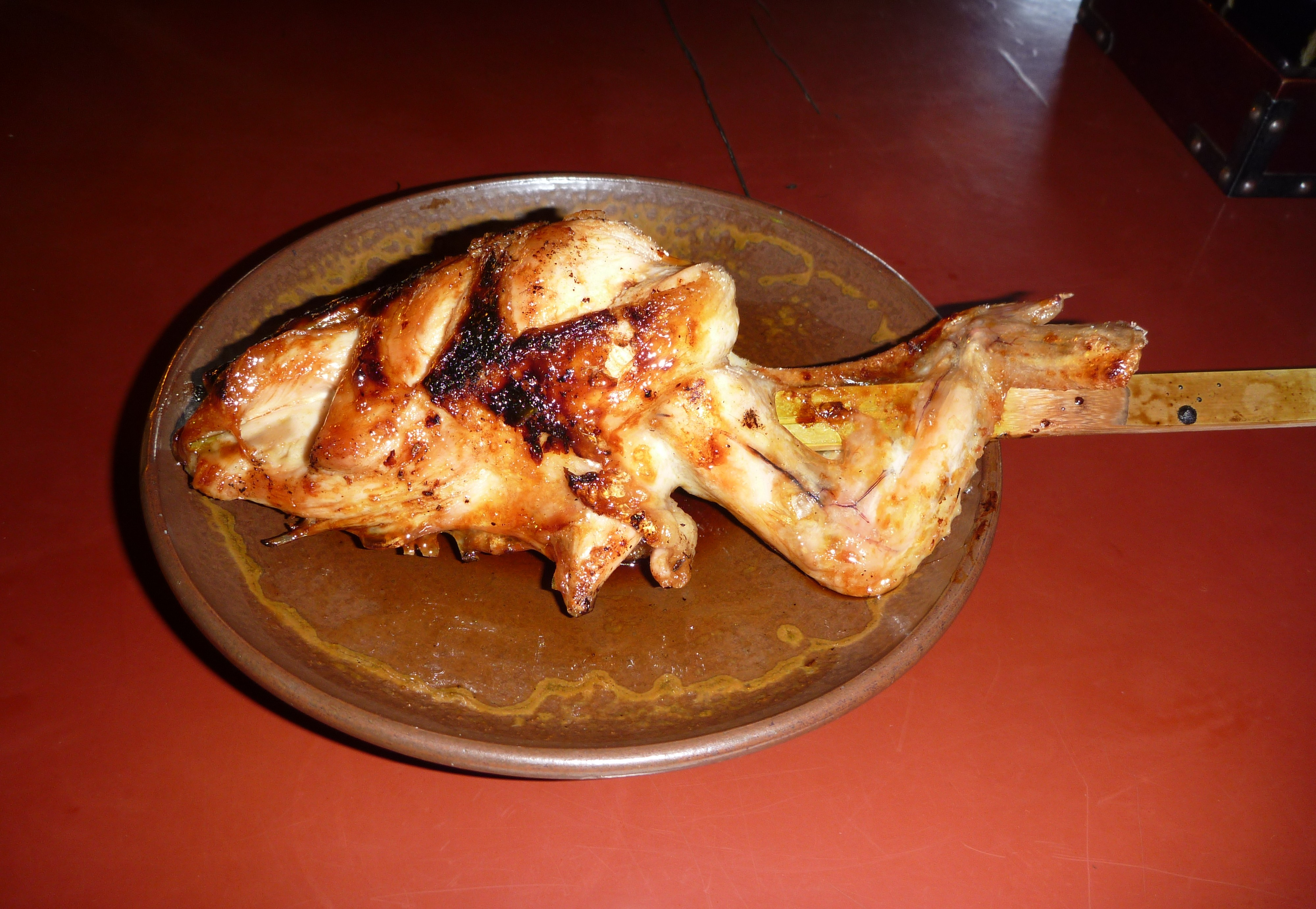 山賊焼(いろり山賊) 2010年3月 撮影